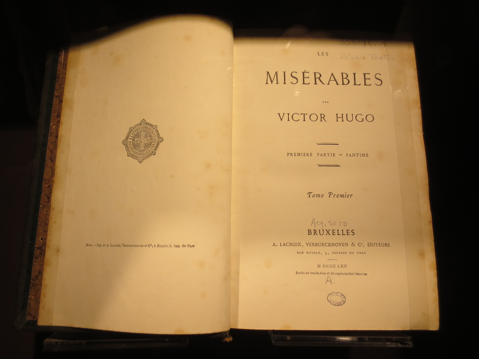 Maison natale de Victor Hugo : oeuvre " les misérables " de Victor Hugo, première édition de A. Lacroix Verboeckhoven & Cie de 1862